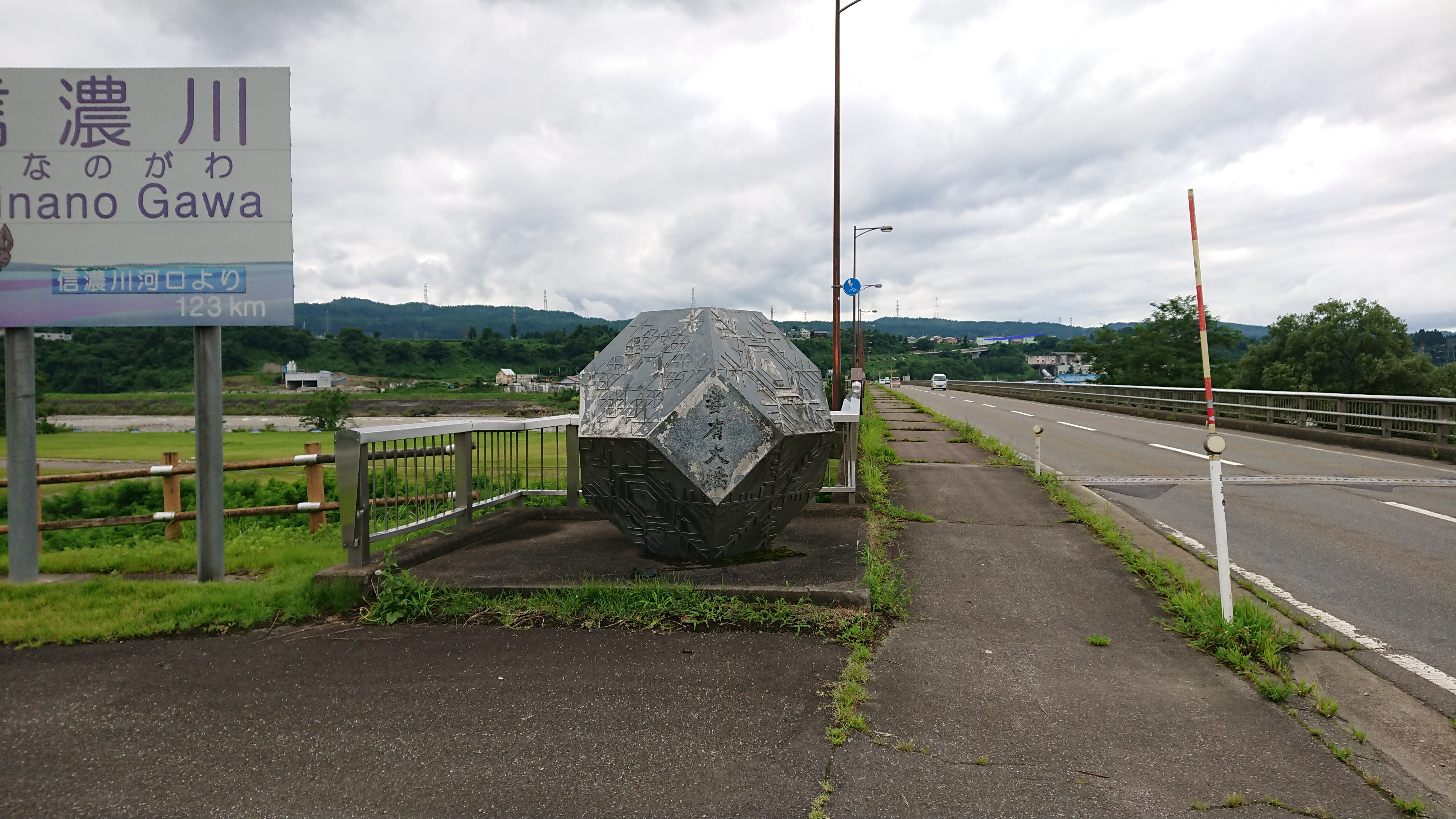 妻有大橋を上流右岸端より撮影。 新潟県十日町市、2020年7月30日。